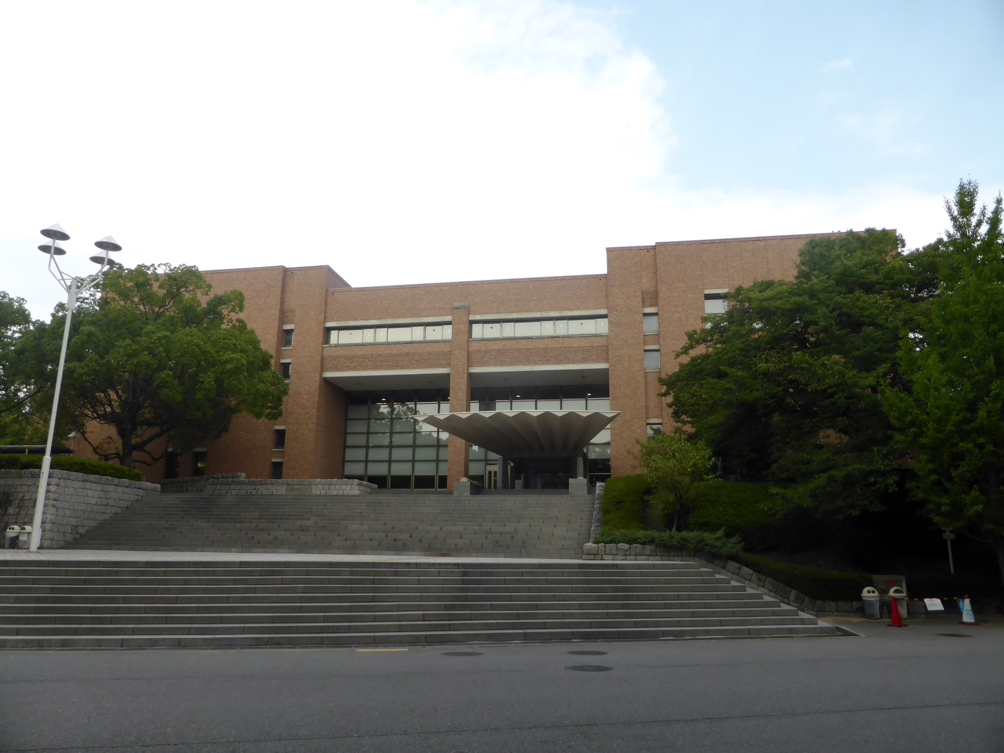 関西大学総合図書館を撮影。